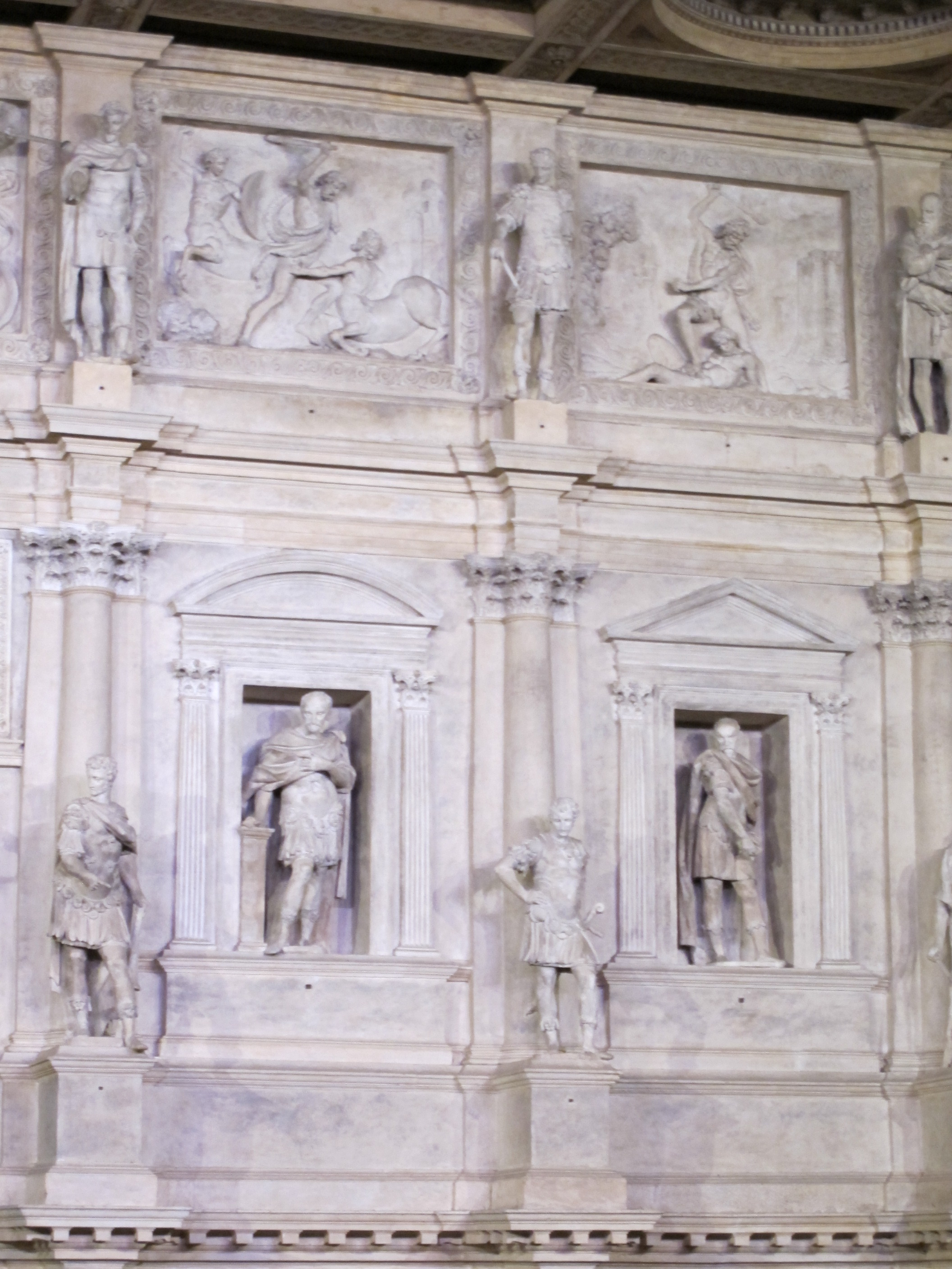 Teatro olimpico, scena, statue